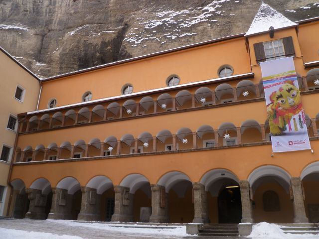 ehem. Bürgerspital, Admonter Hof, Spielzeugmuseum